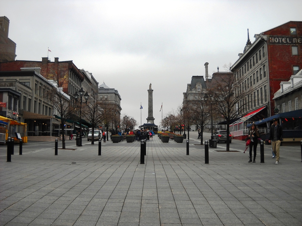 Centre-Ville (Montreal)